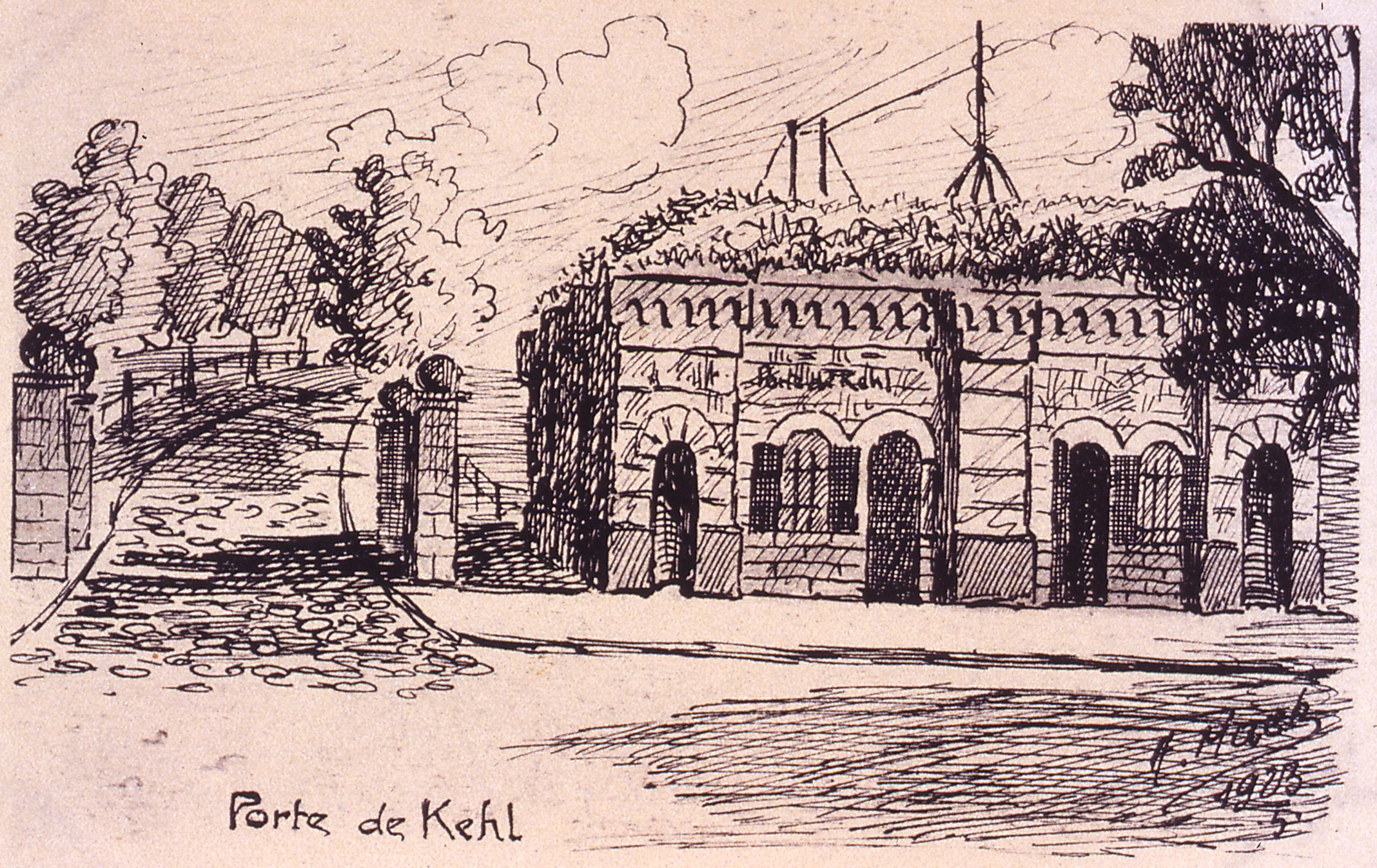 Dessin de la porte de Kehl à Strasbourg en 1923 par A. Maetz